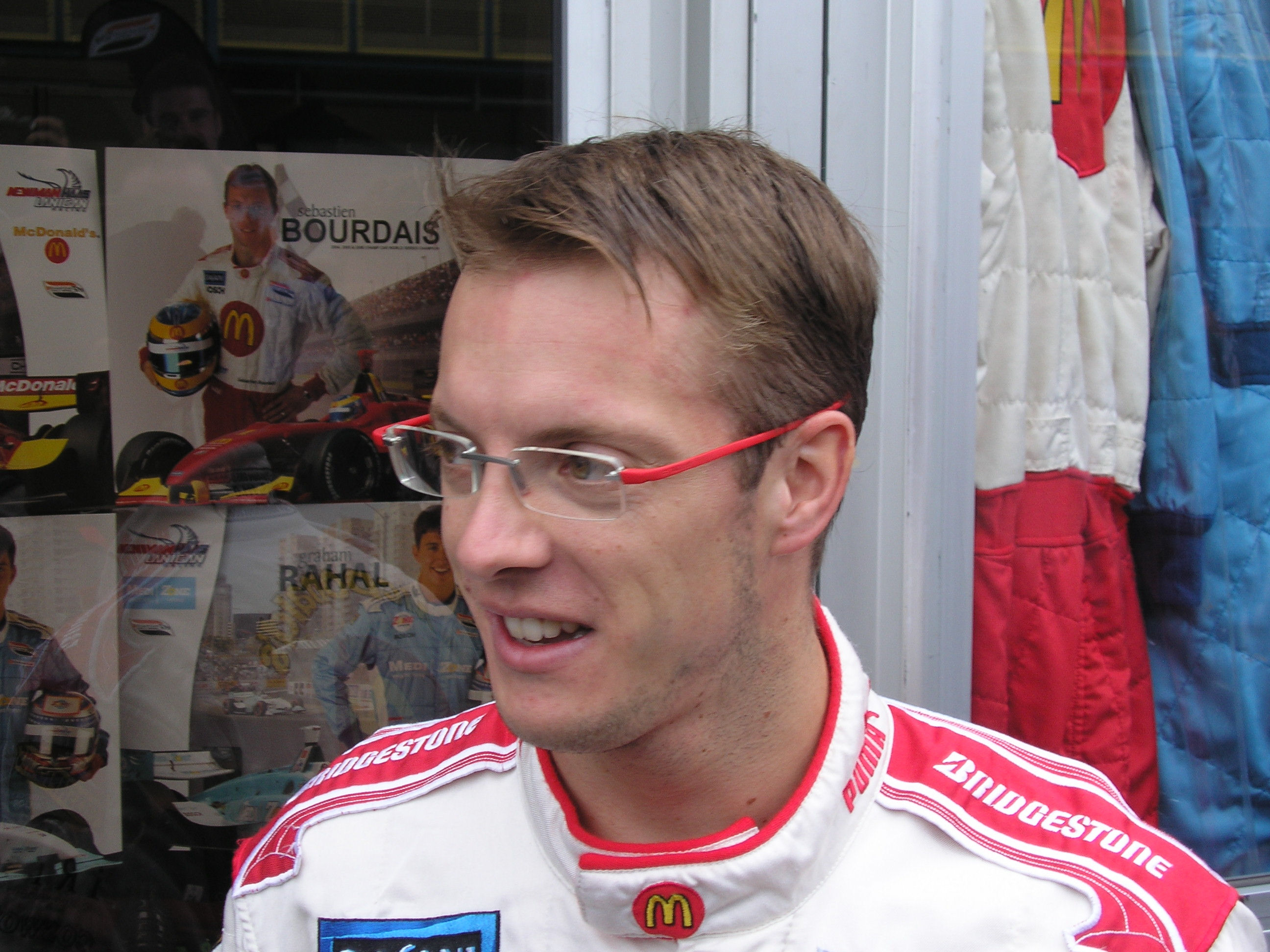 Sebastien Bourdais tijdens de ChampCar in Assen.